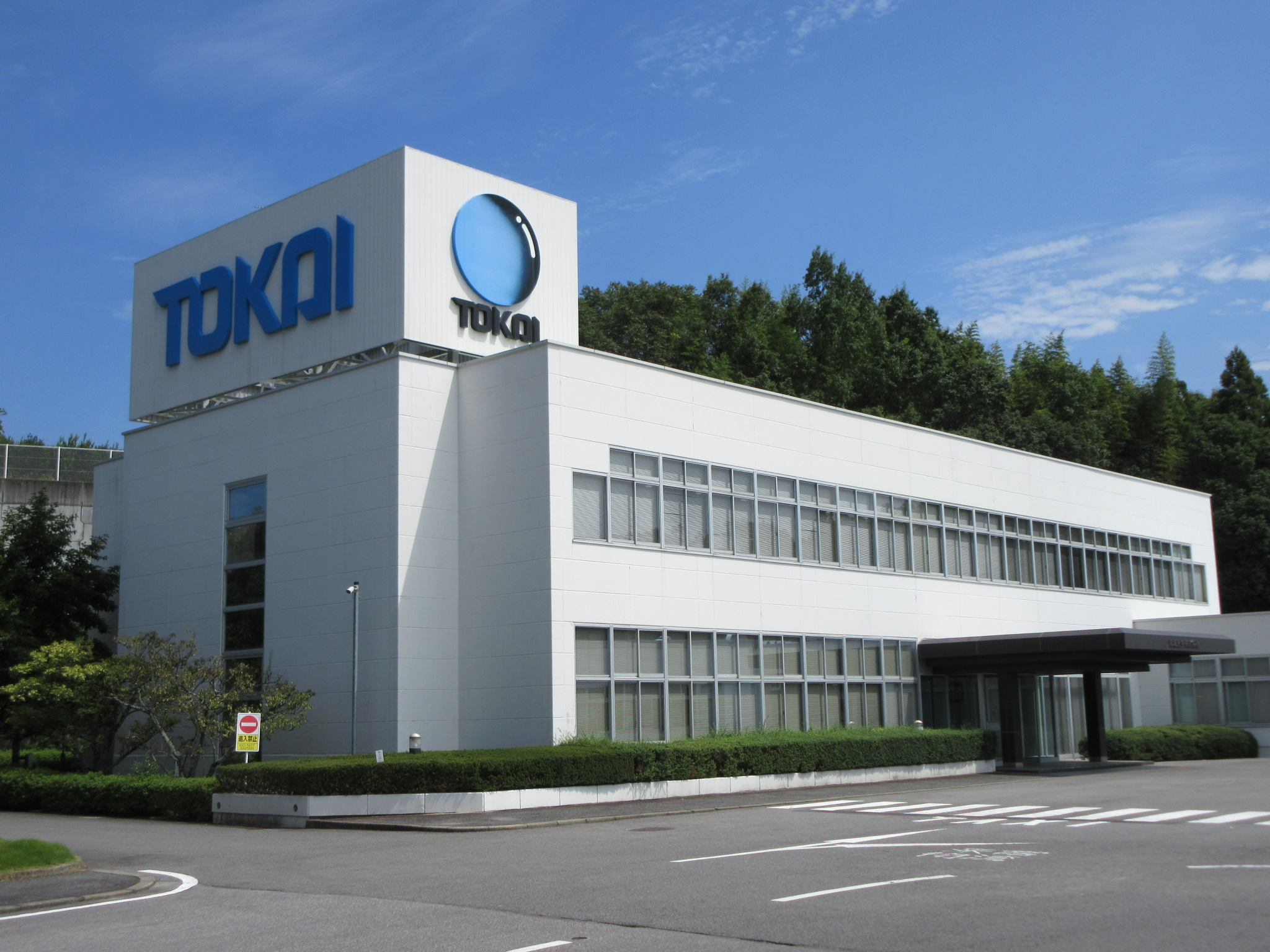 東海光学株式会社（岡崎市恵田町）